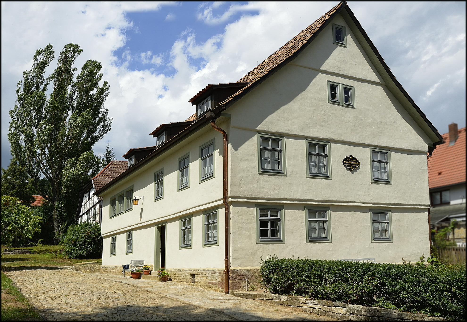 Leider hat die Kulturstiftung Weimar das Fachwerk komplett überputzen lassen. Fachwerk ade.